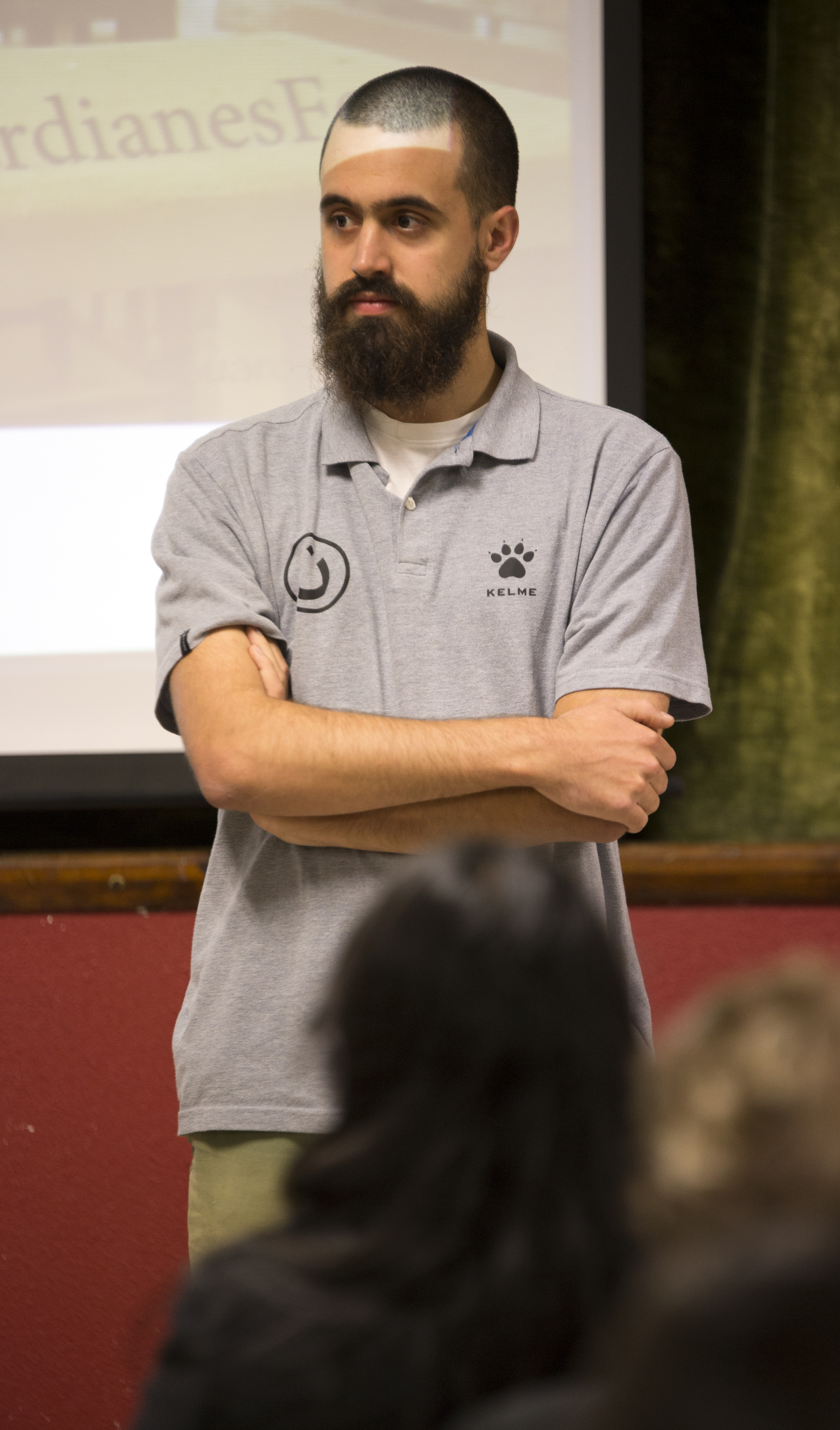 Fotografía: Ángel Cantero | 6-11-2015 - Mas de 200 personas acudieron en la tarde del viernes 6 de Noviembre, a la conferencia que impartió el joven periodista y escritor catalán Jaume Vives Vives, bajo el título “Guardianes de la Fe. Cristianos perseguidos de Irak”. El acto, que hizo que el salón parroquial estuviese a rebosar, teniendo que permanecer mucha gente en pie, tuvo lugar en el centro parroquial “El Castillo”, de Iscar En su mayoría los asistentes eran jóvenes de confirmación de la parroquia de Iscar, así como algunos venidos de pueblos limítrofes y de Valladolid.